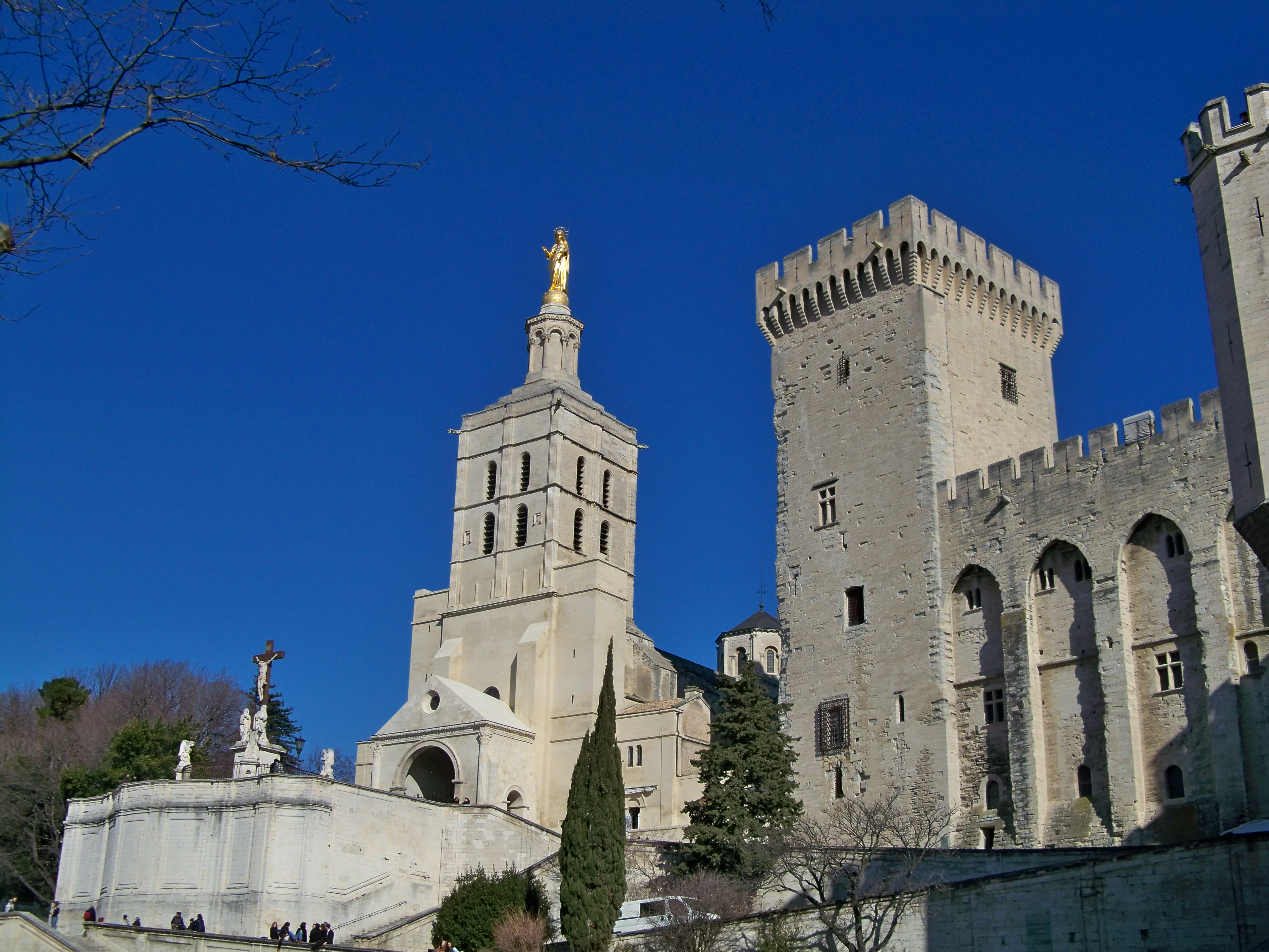 notre Damle des Doms d'Avignon, Vaucluse